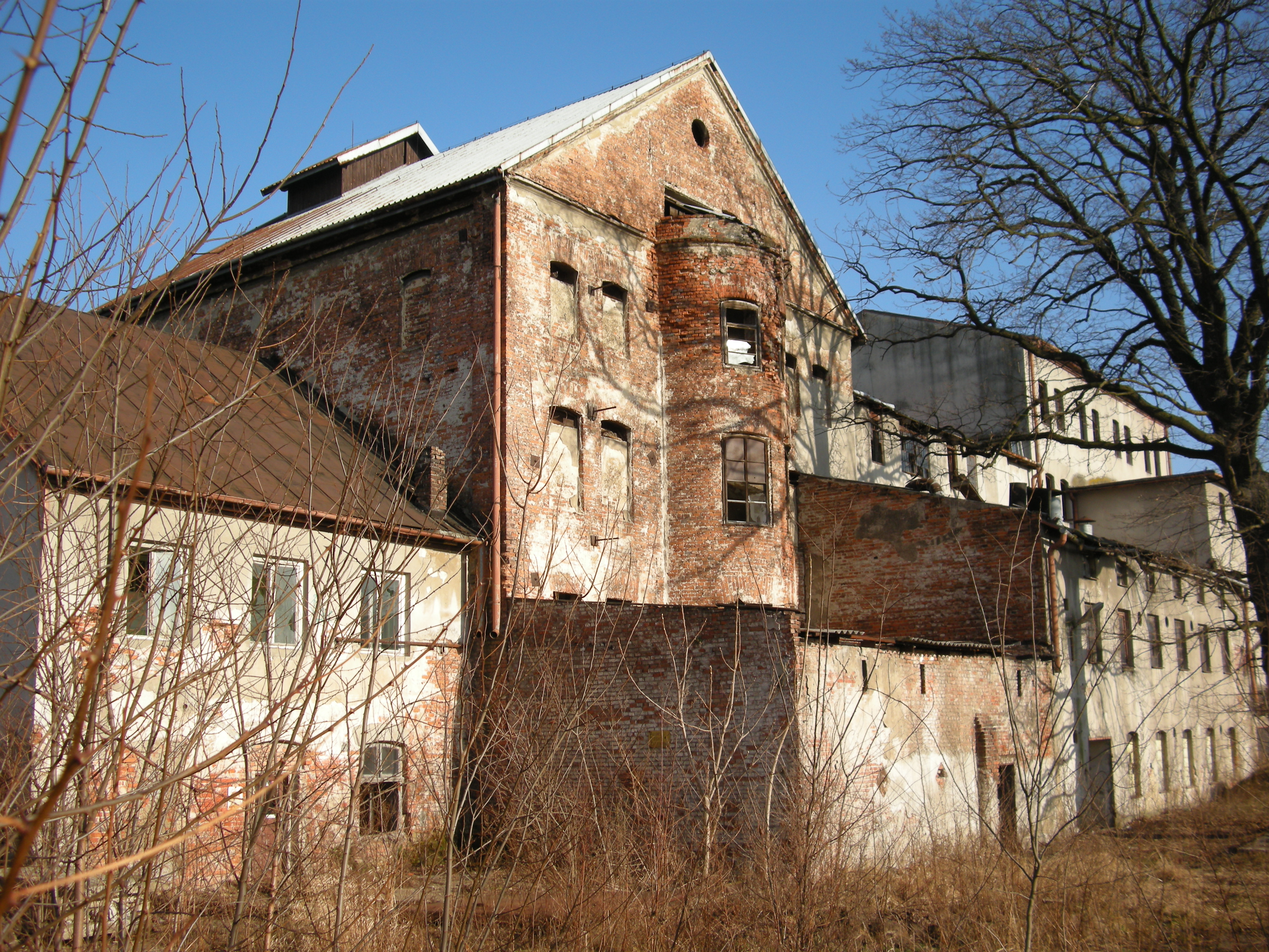 Młyn Szancerów z 1846 r.